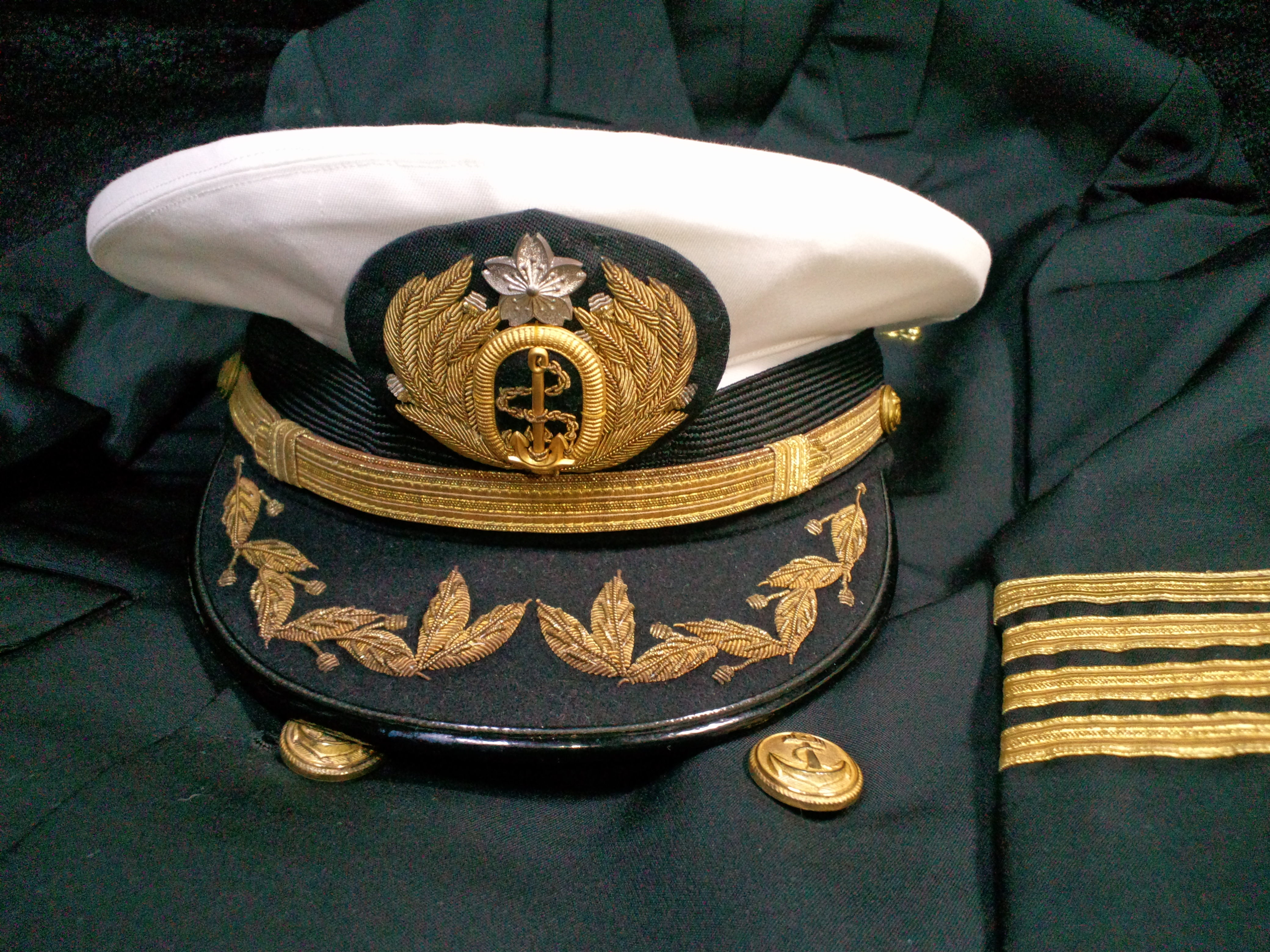 海上自衛隊佐官用正帽